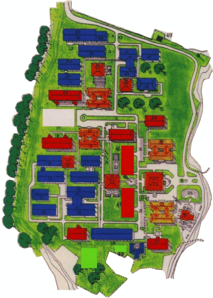 Denah Polban